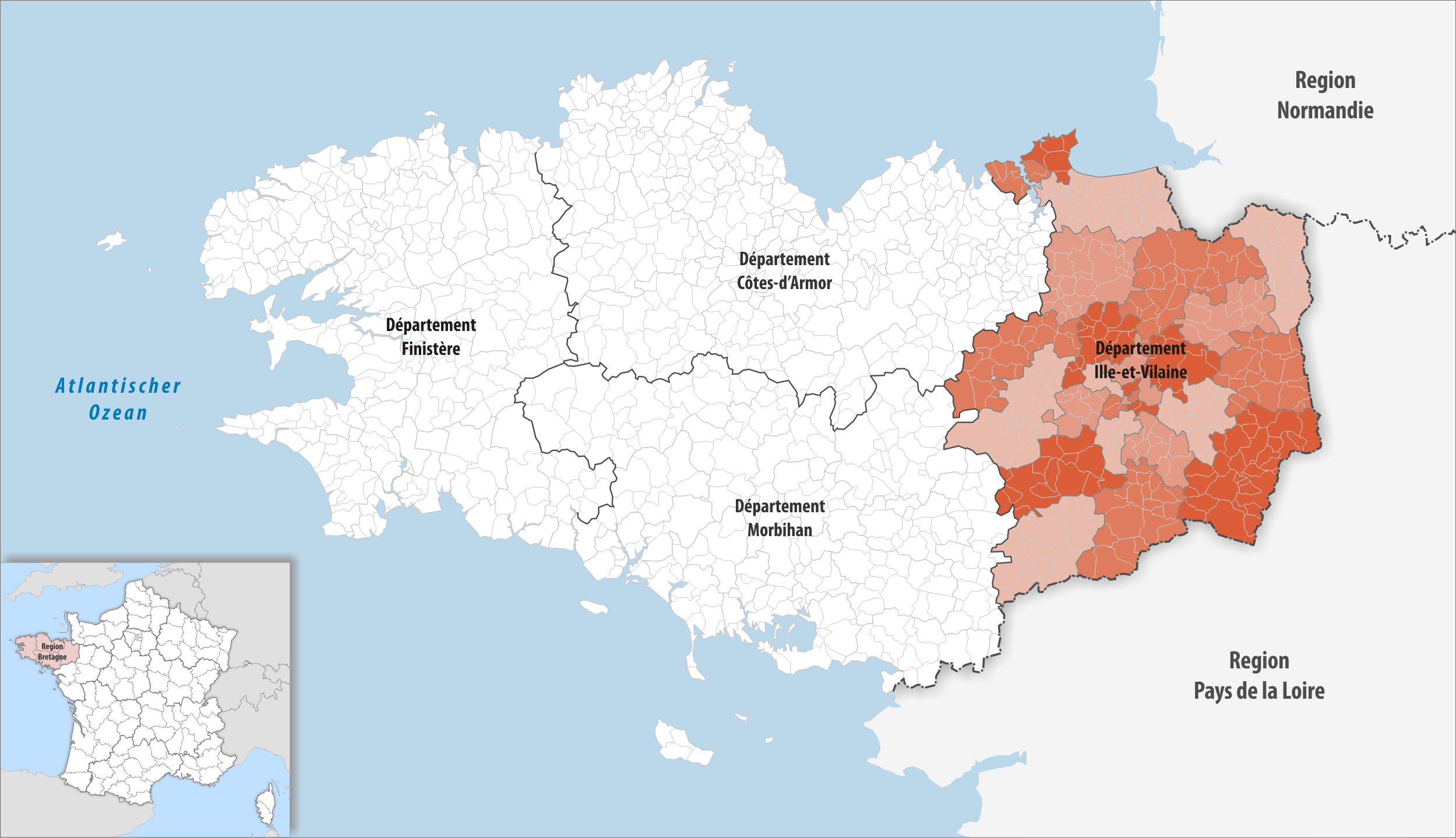 Lage des Departements Ille-et-Vilaine